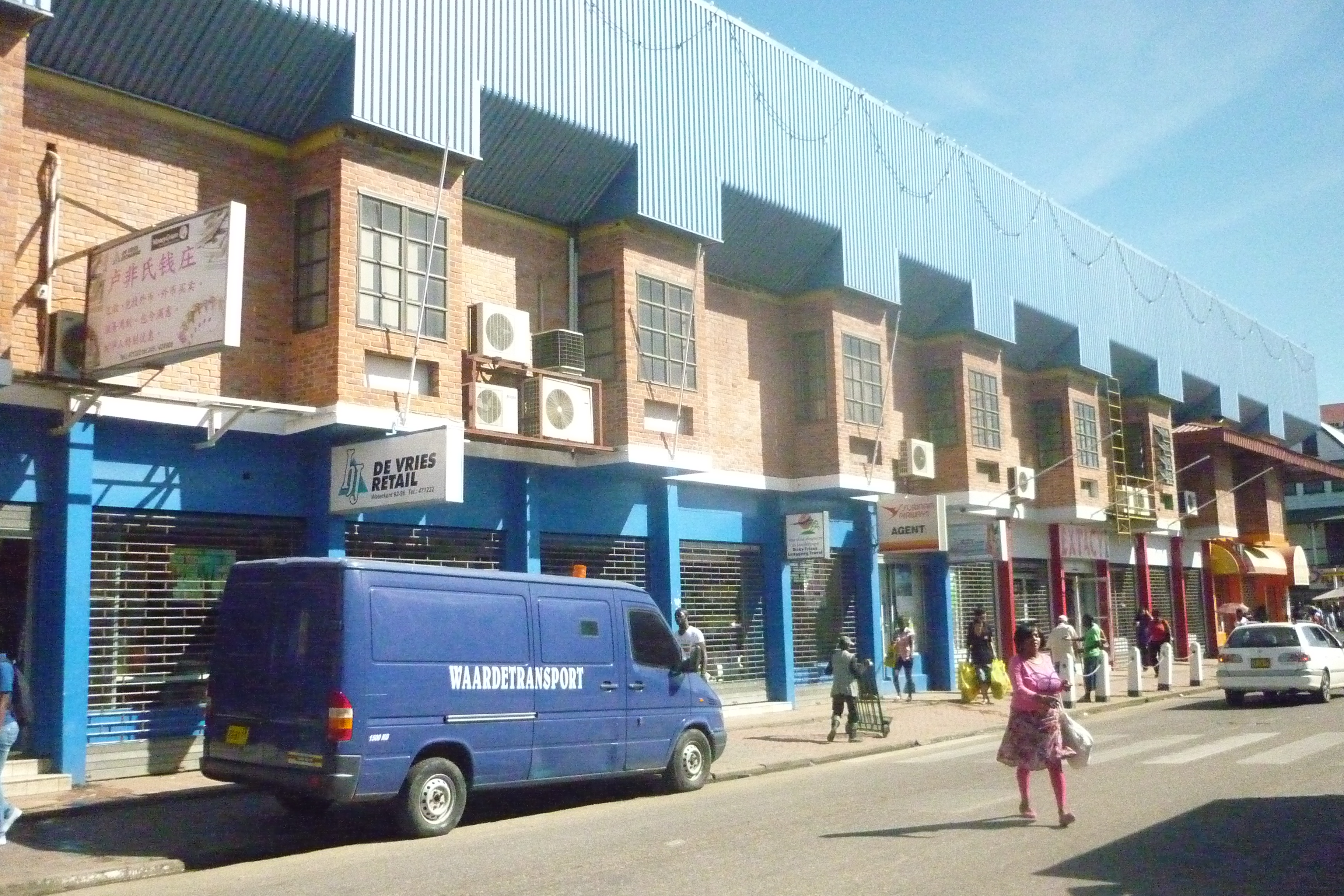 Paramaribo De Vries IJzerhandel